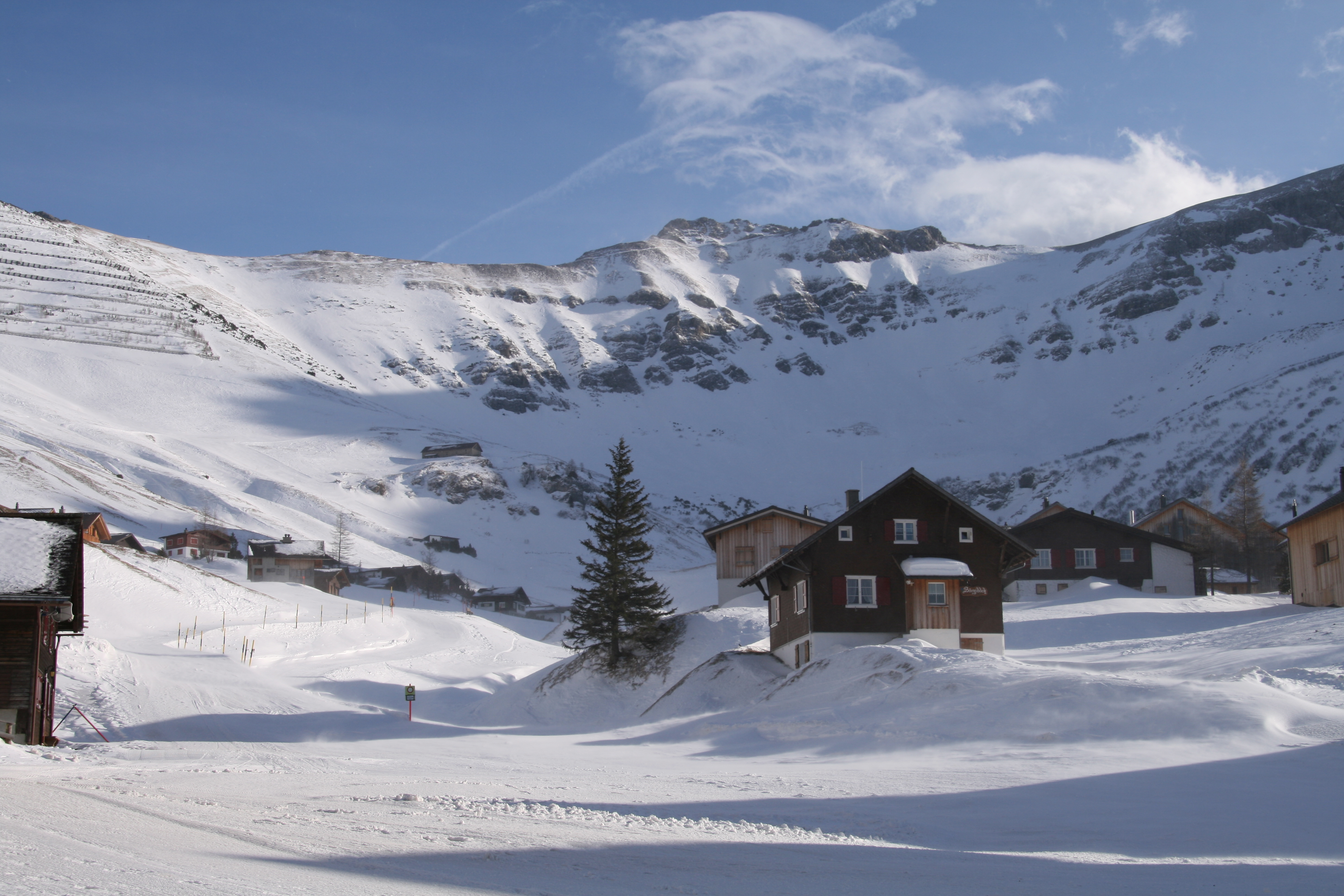 Schneetreiben im Talkessel von Malbun.